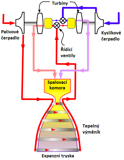 Schéma fungování motoru Raptor.